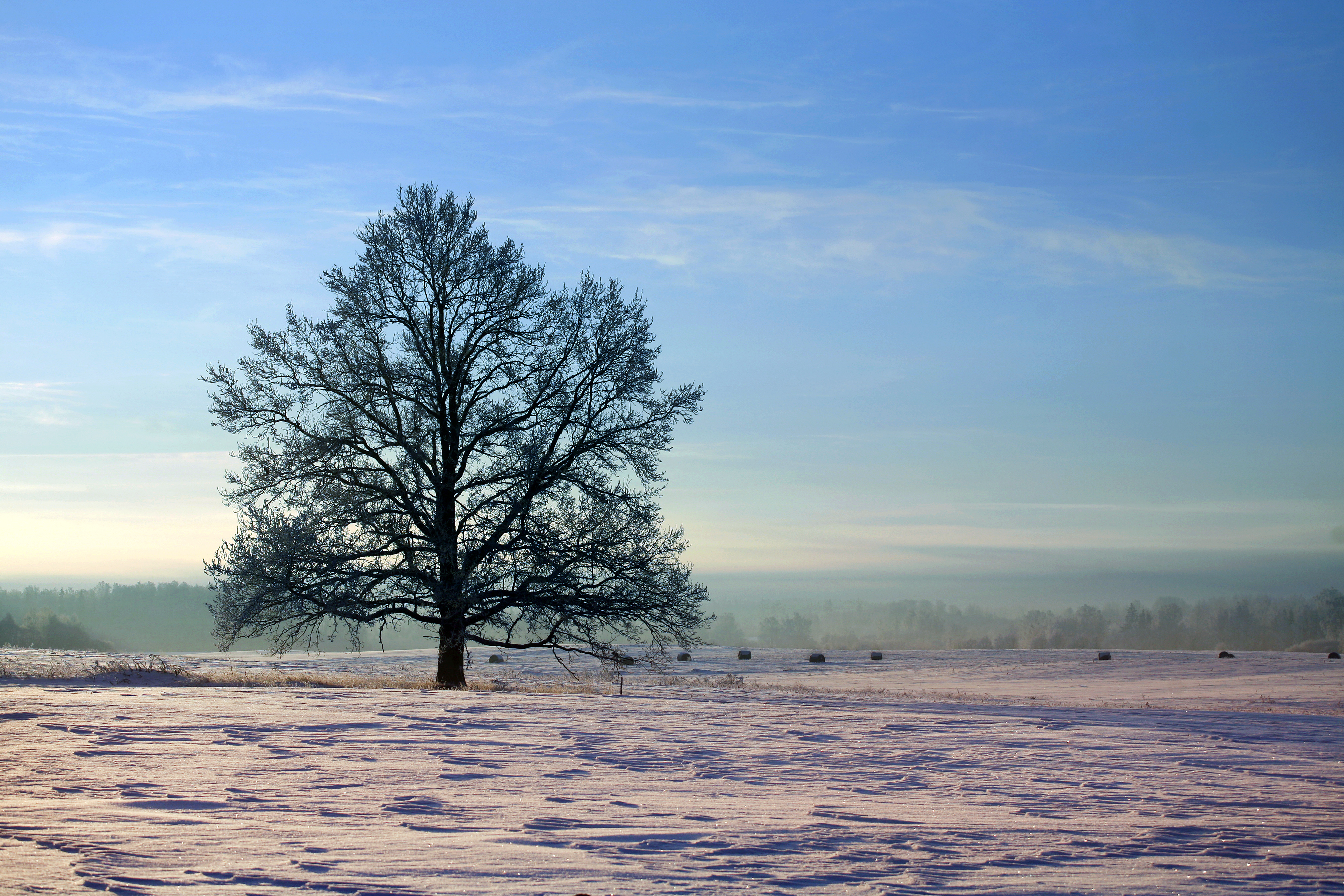 Ozols netālu no Lielcieceres (agrāk Imantas)